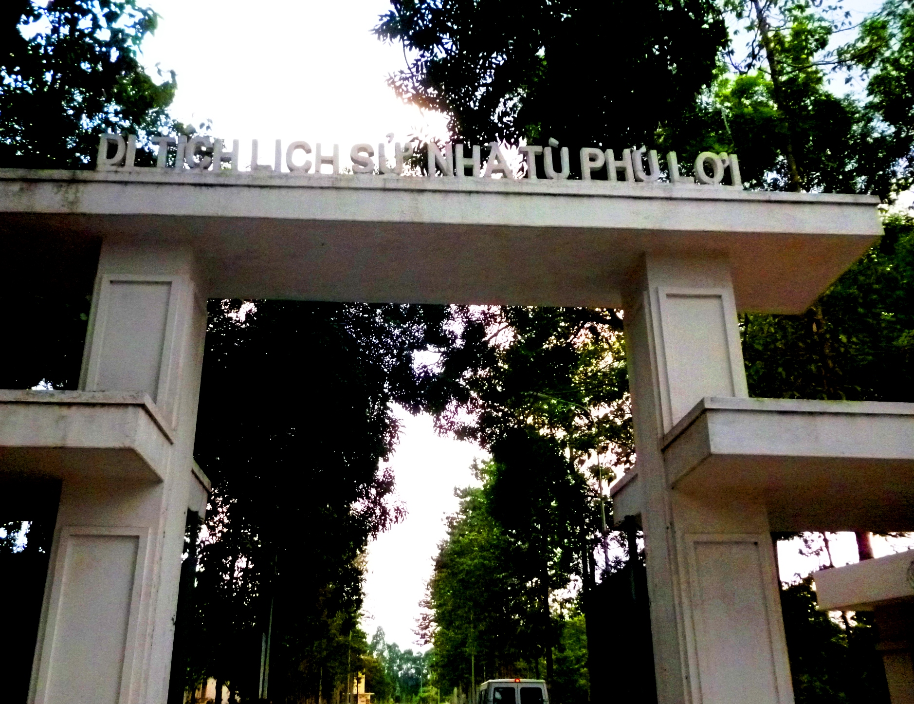 Hình chụp cổng vào của Nhà tù Phú Lợi